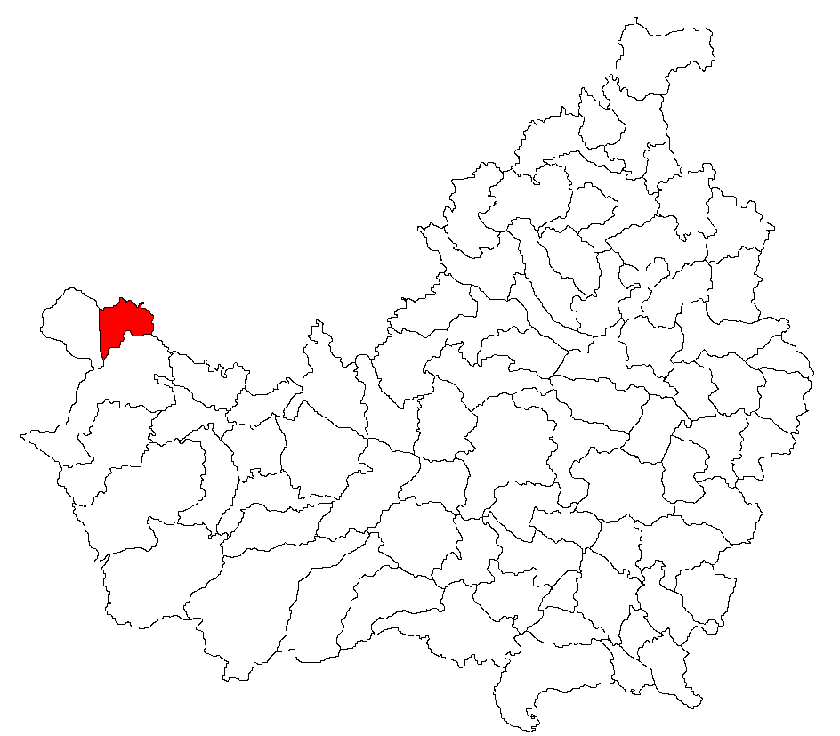 Categorie:Hărţi ale judeţului Cluj